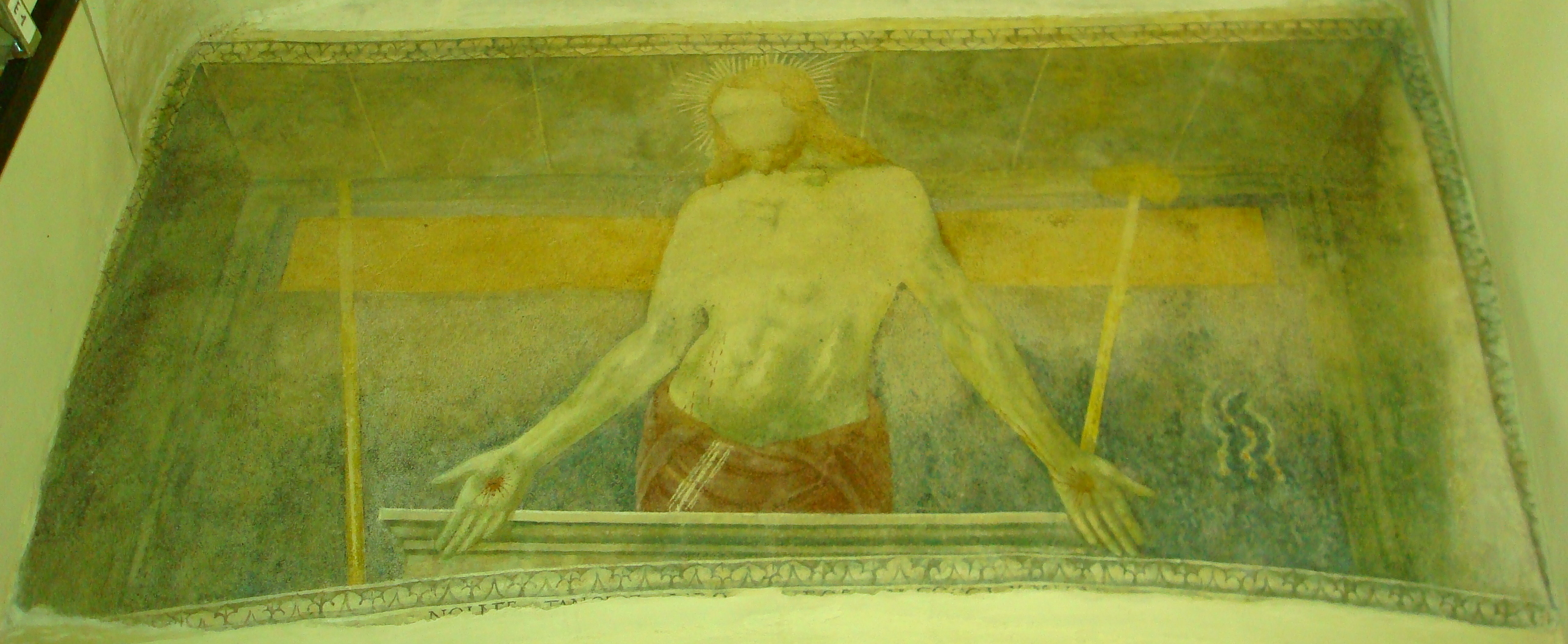 Christo patiens scuola botticelliana affresco nella stanza a destra della Chiesa di Santa Maria della neve nel Complesso Le murate a Firenze